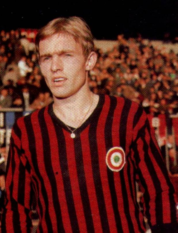 Nevio Scala che indossa la maglia del Milan